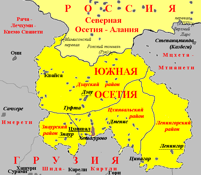 административное деление Республики Южная Осетия (районы РЮО)